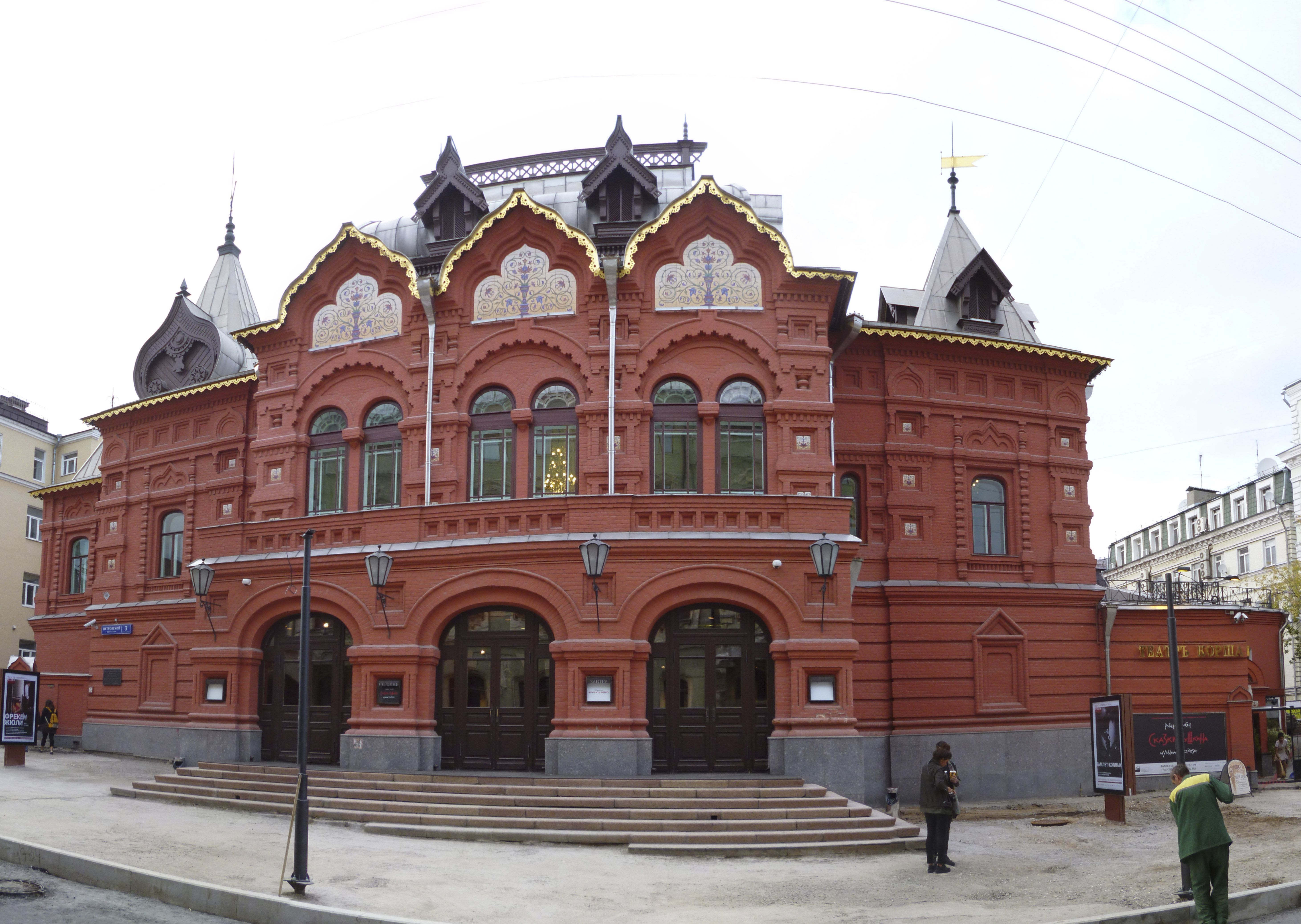 Русский драматический театр (Ф.А.Корша): Петровский пер., дом 3, строение 1, Тверской, Центральный округ, Москва